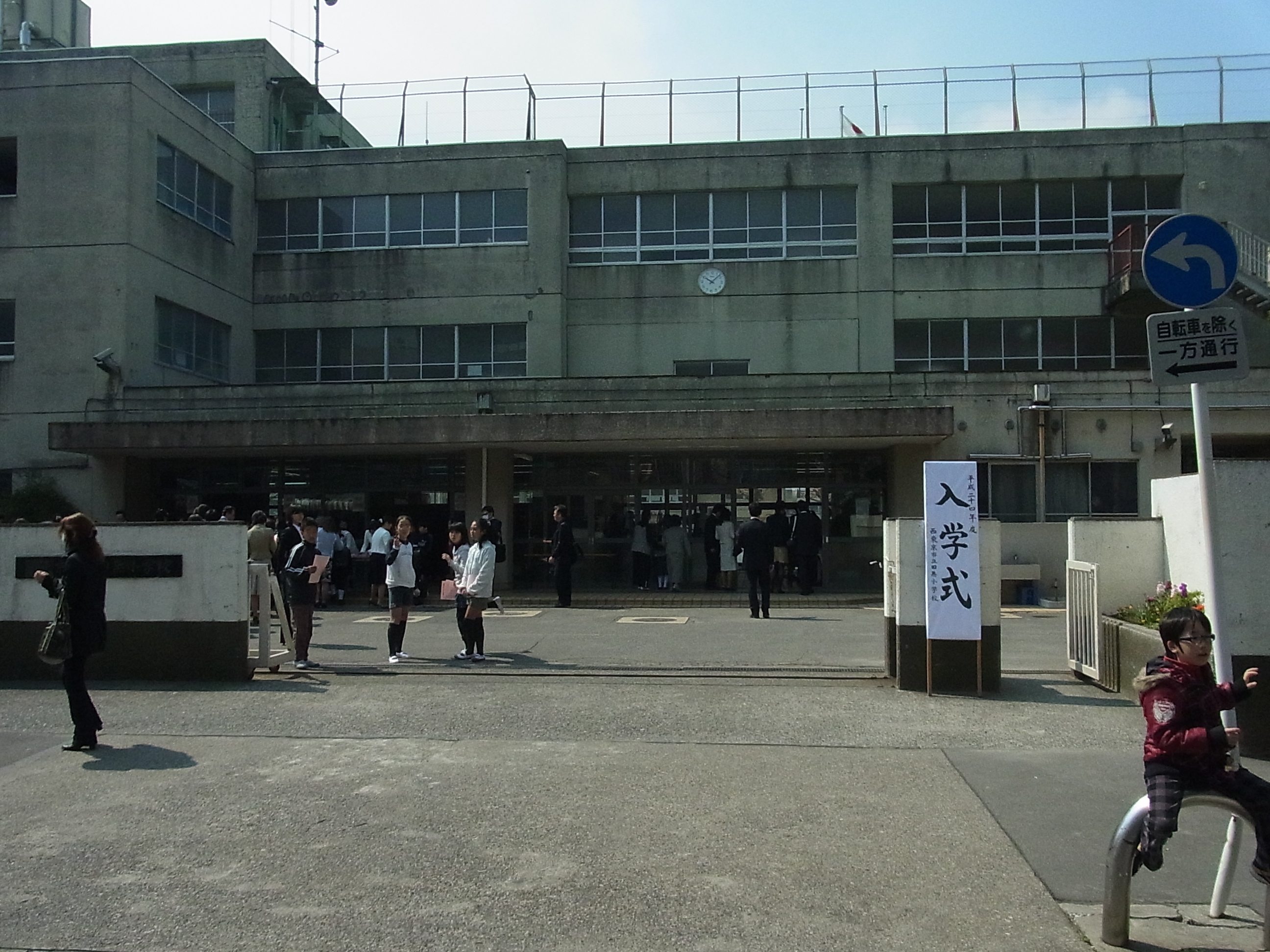 （2012年4月撮影）